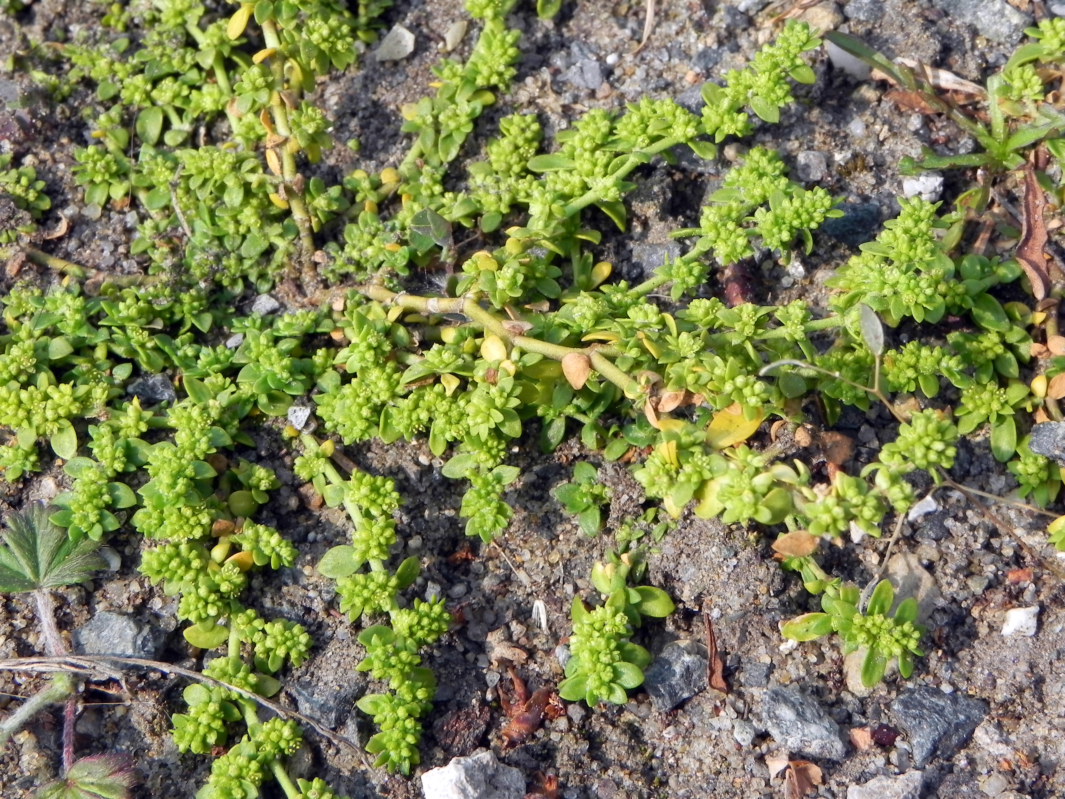 Kahles Bruchkraut (Herniaria glabra) im Naturpark Südheide, Niedersachsen, Germany